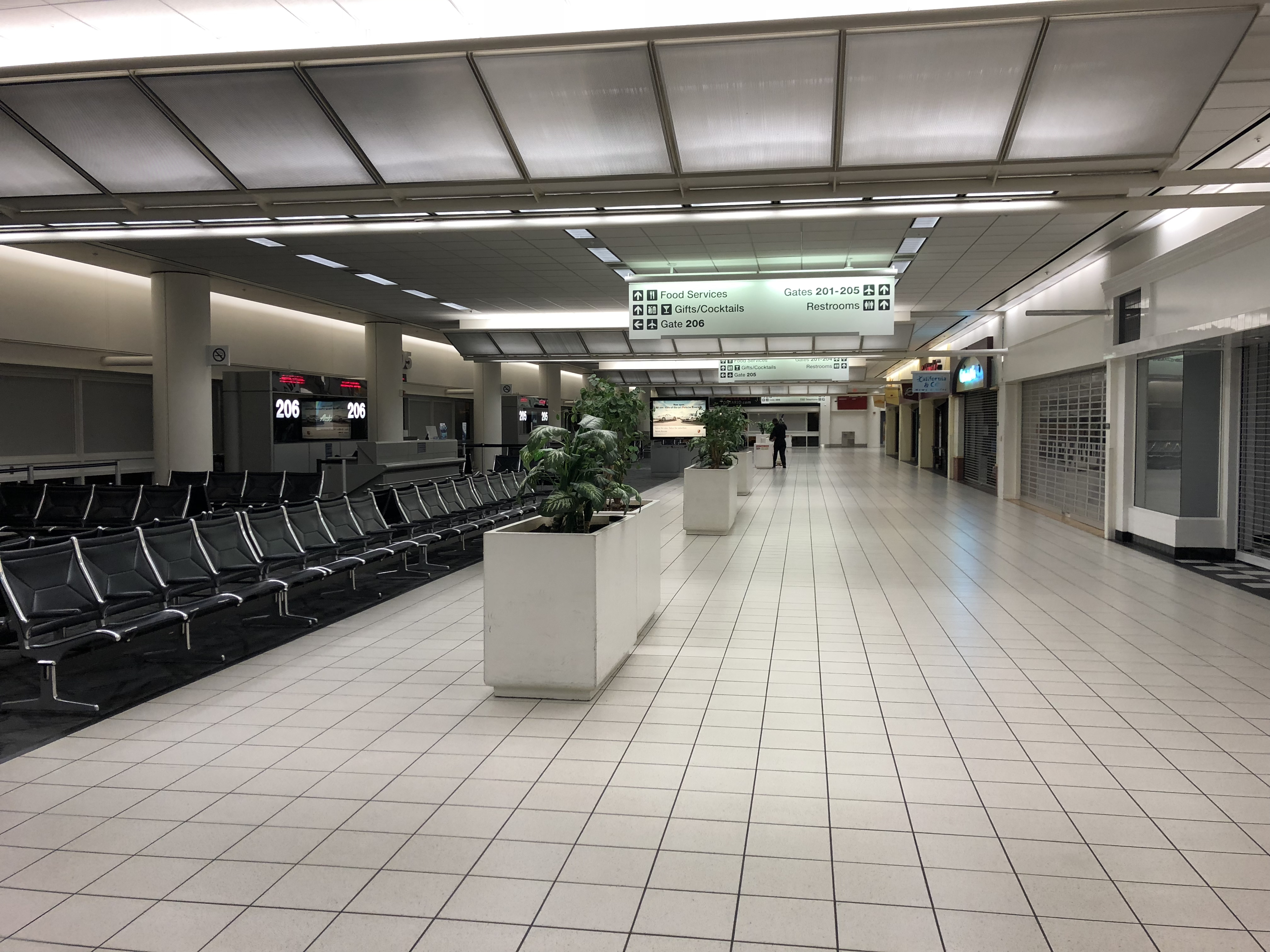 Terminal 2 del Aeropuerto Internacional de Ontario.